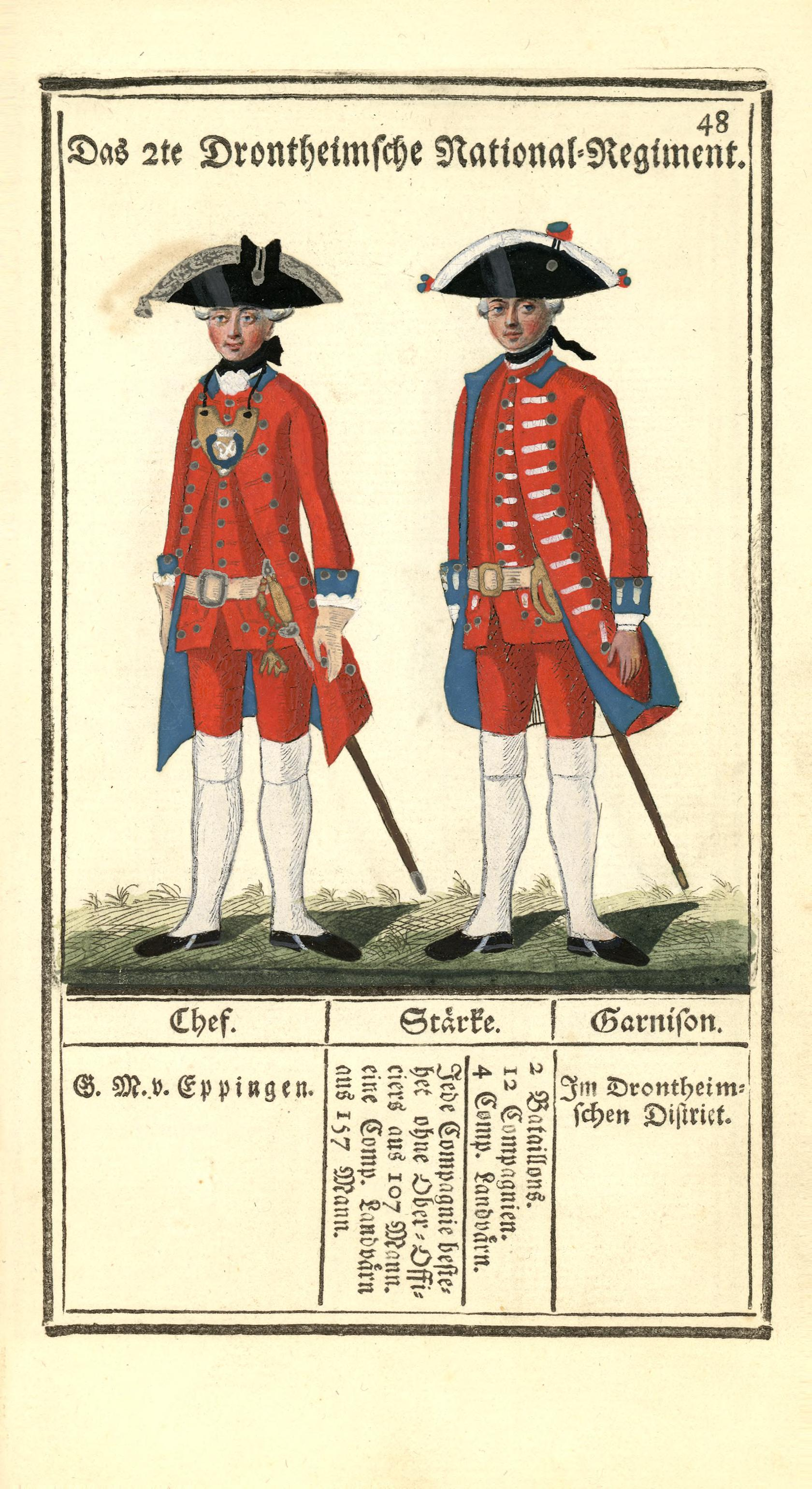 Illustrasjon hentet fra boken "Vorstellung der sämtlichen Königl. Dänischen Armee" av Bertram, Carl og utgitt av Carl Bertram (dk, 1763)